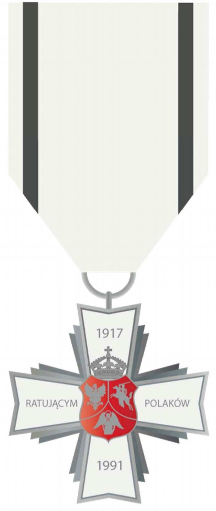 Krzyż Wschodni – odznaka na wstążce